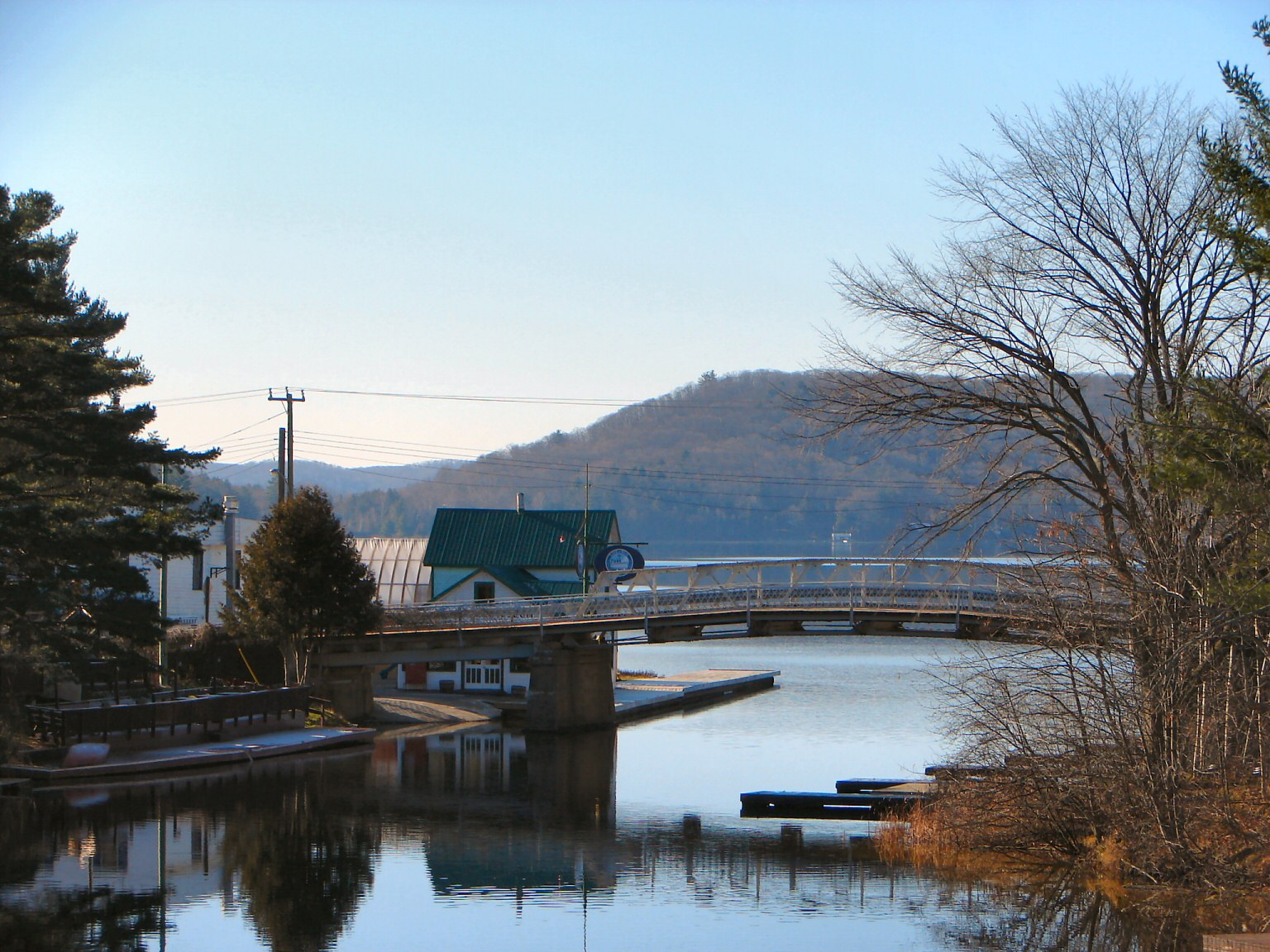 Dorset, Ontario, Canada